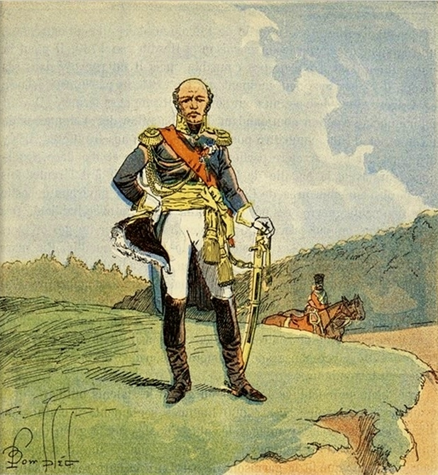 Le maréchal Louis-Nicolas Davout, duc d'Auerstaedt et prince d'Eckmühl.